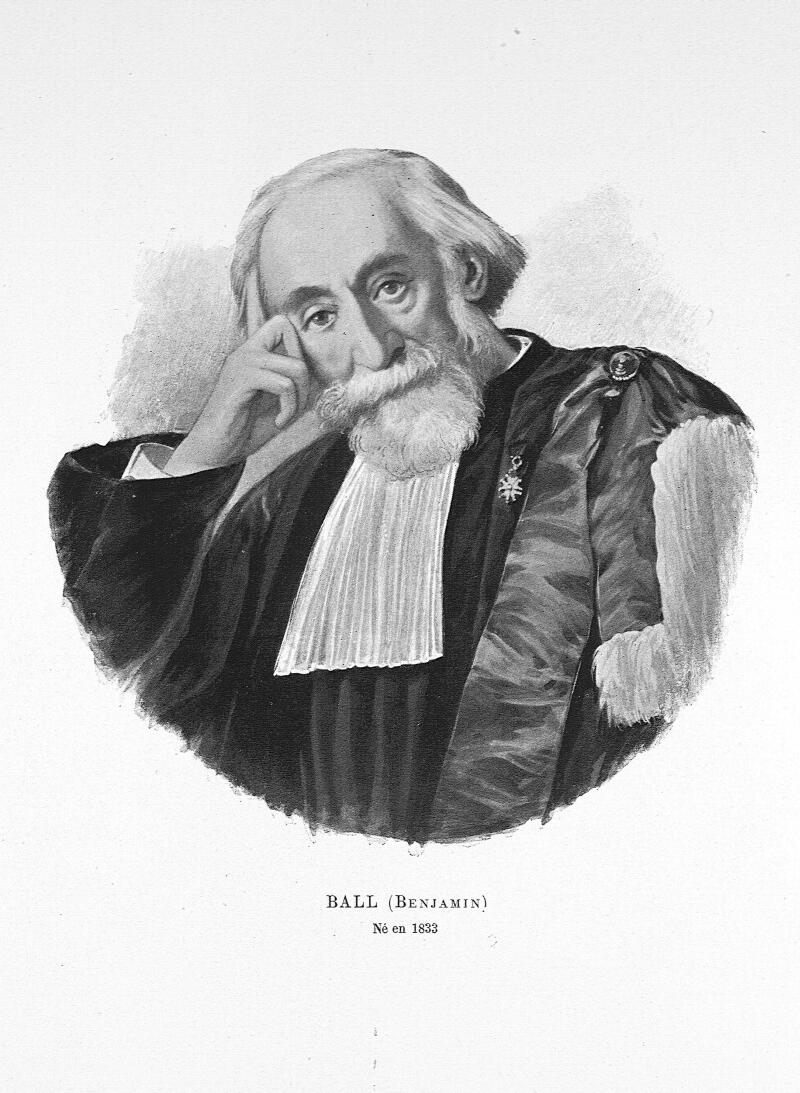 Le docteur Benjamin Ball (1833-1893)